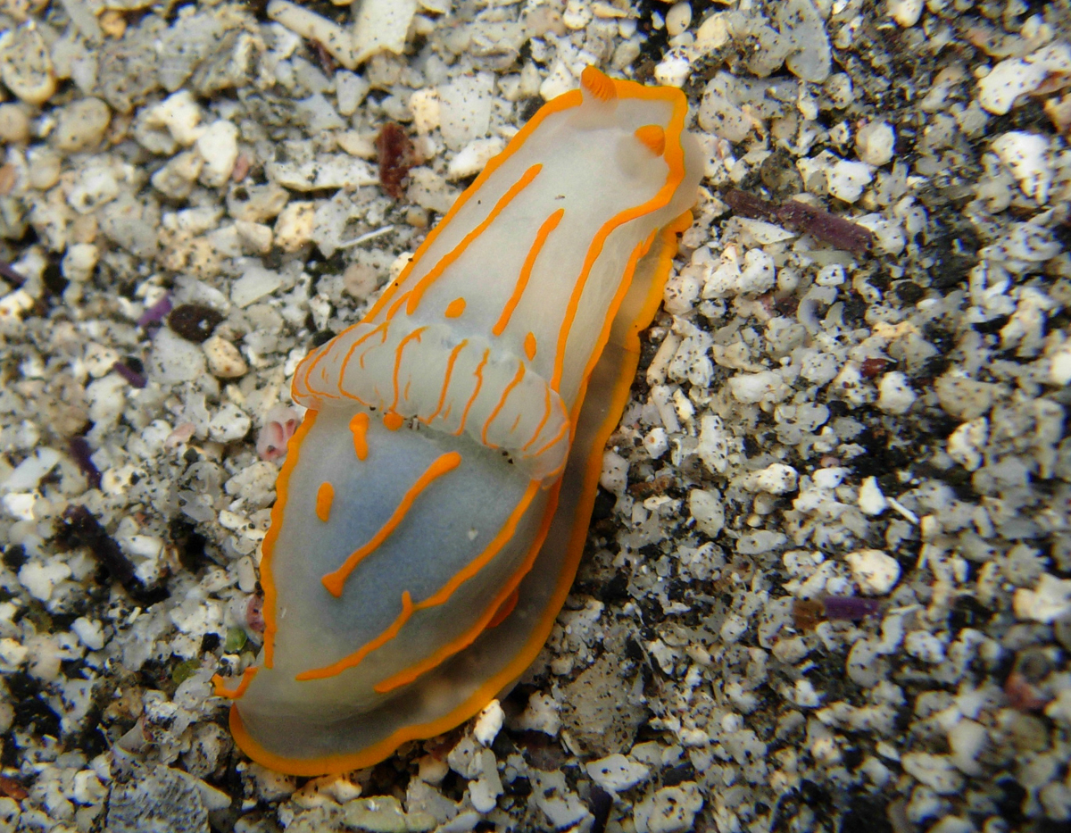 Un Gymnodoris striata à la Réunion.